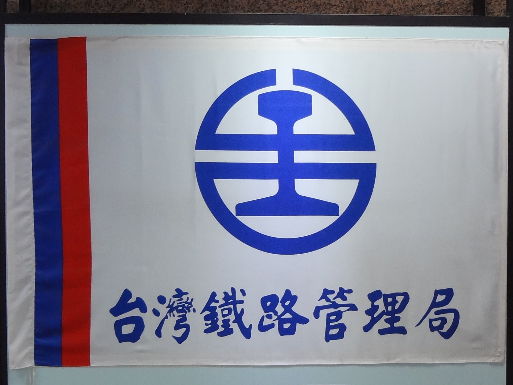 中文（台灣）: 臺北車站一樓展示的臺灣鐵路管理局局旗。